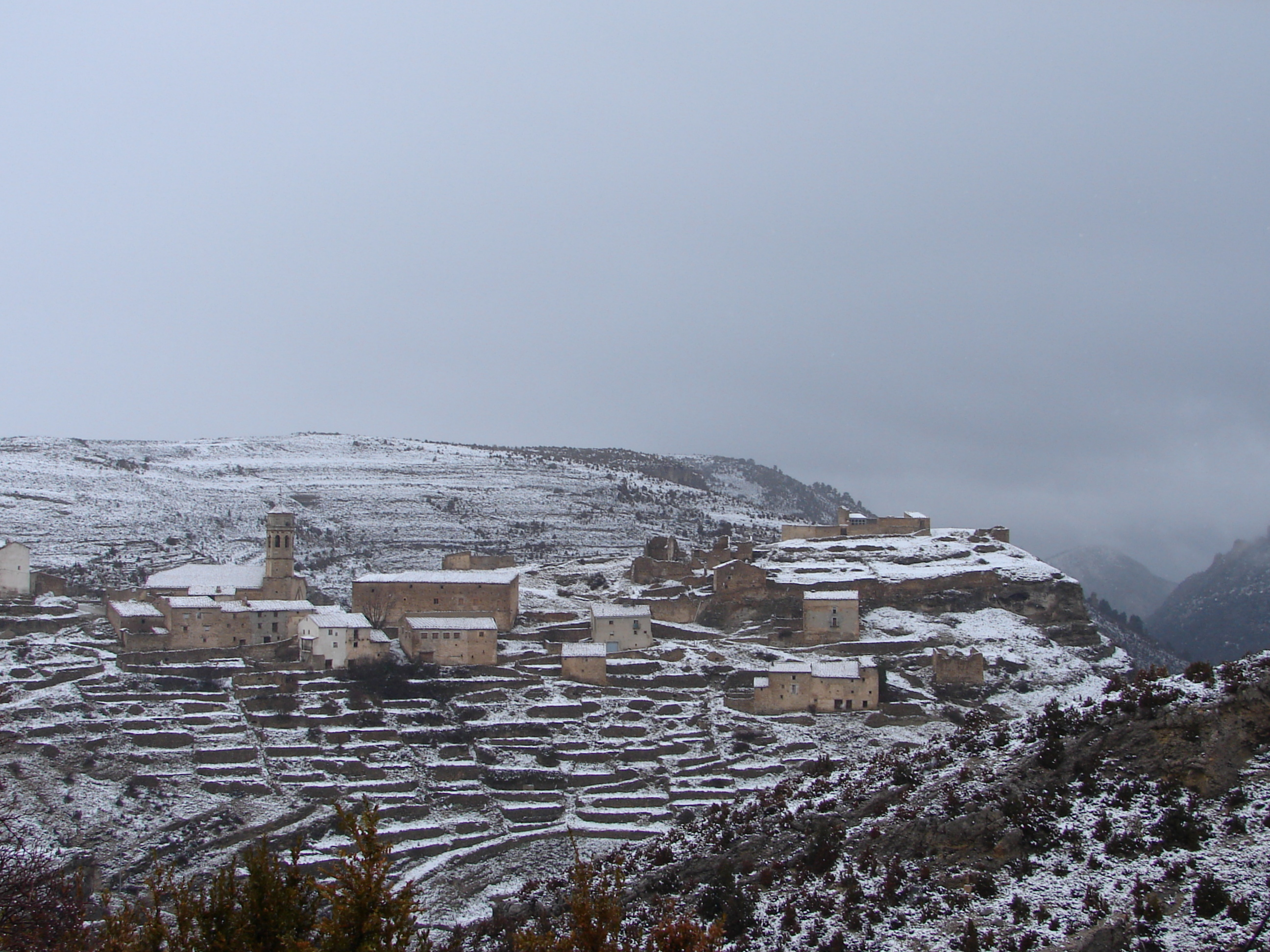 nieve